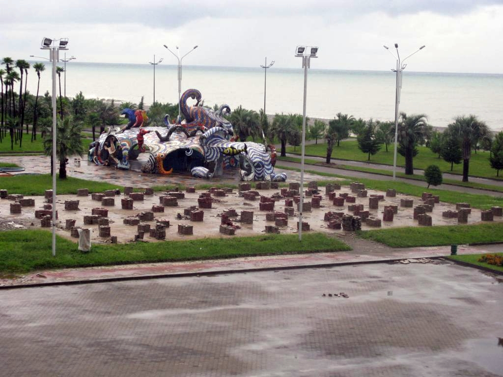 Кафе «Фантазия» (груз. კაფე ფანტაზია), в Батуми более известное под названием «Рвапеха» (груз. რვაფეხა — «осьминог»)